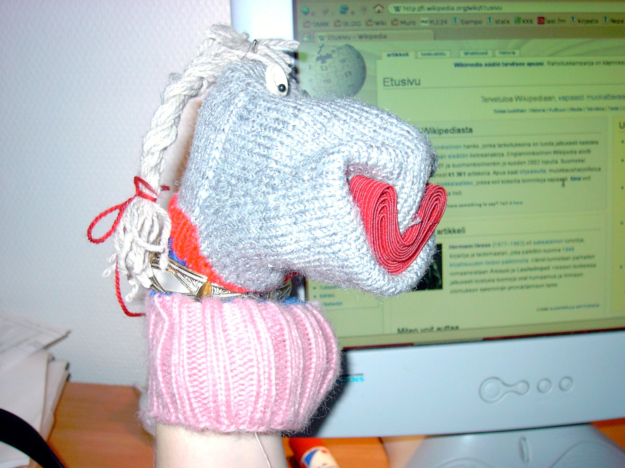 "Hei! Minä olen Irja ja olen ehdottomasti sitä mieltä että Myrtistä pitäisi tehdä BYROKRAATTI!" "HELLOOOO my name is Irja and I definitely agree with these wonderful voters that Myrtti should be made a bureaucrat!" (notice boobs)